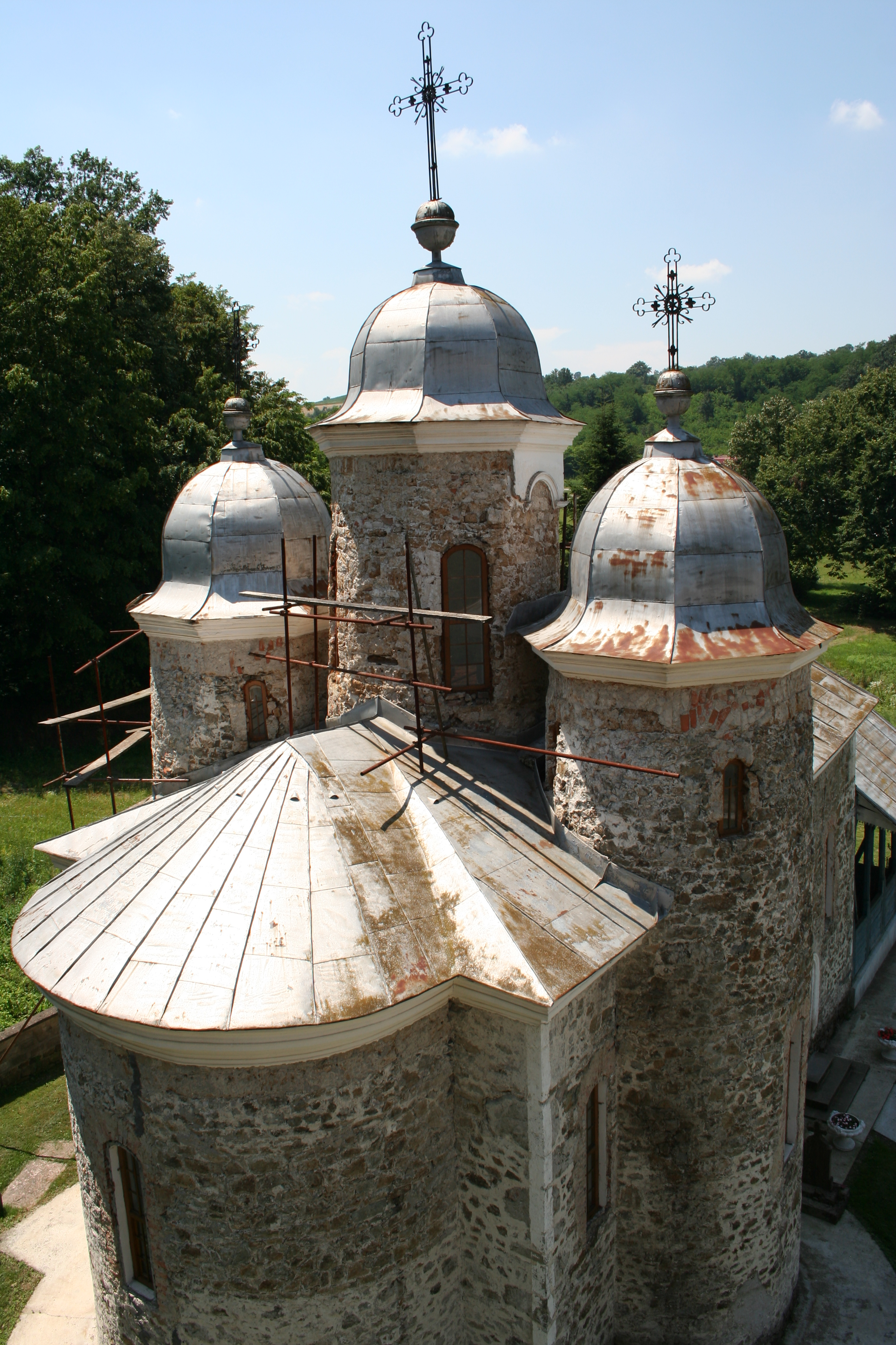 Crkva Preobraženja Gospodnjeg, Krivaja